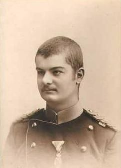 King Aleksandar I Obrenović of Serbia in 1890